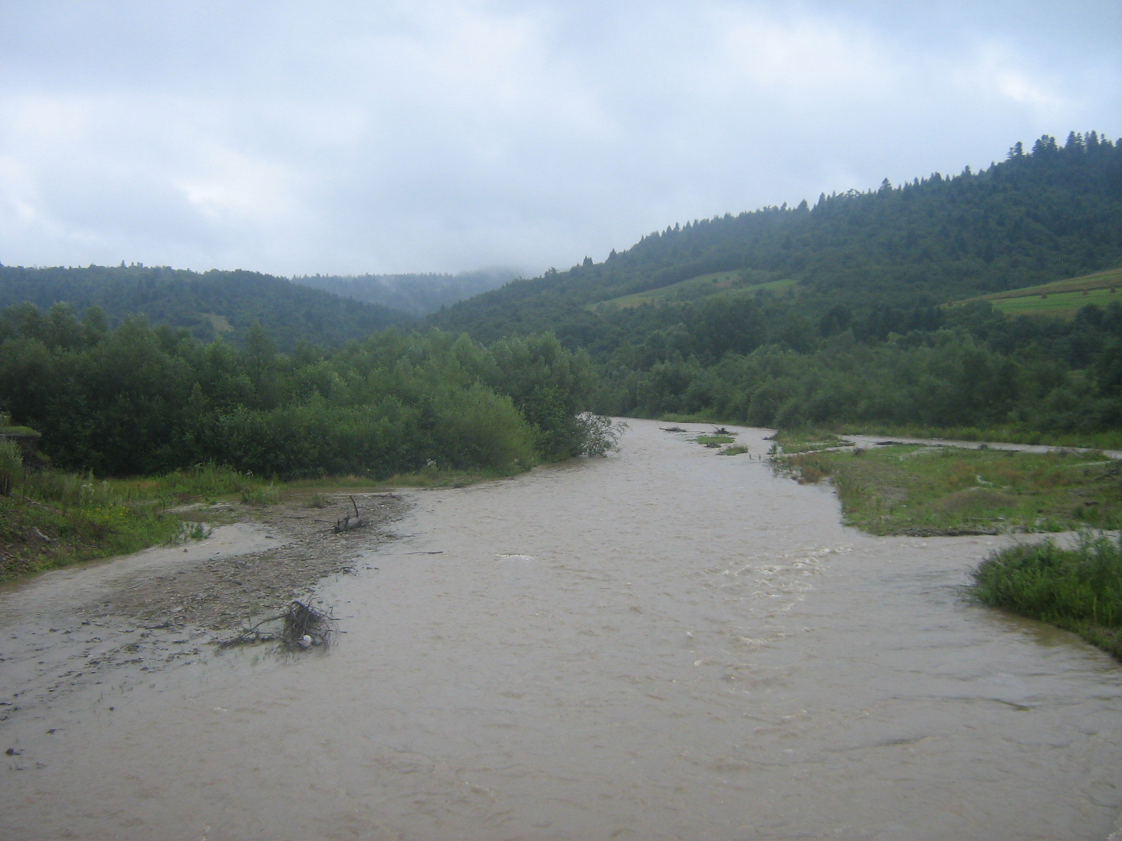 р.Топільниця після дощу літом